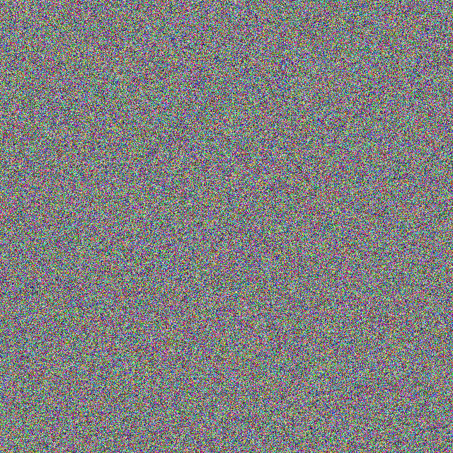 Png with every pixel having an independent uniformly sampled random color. Random noise.